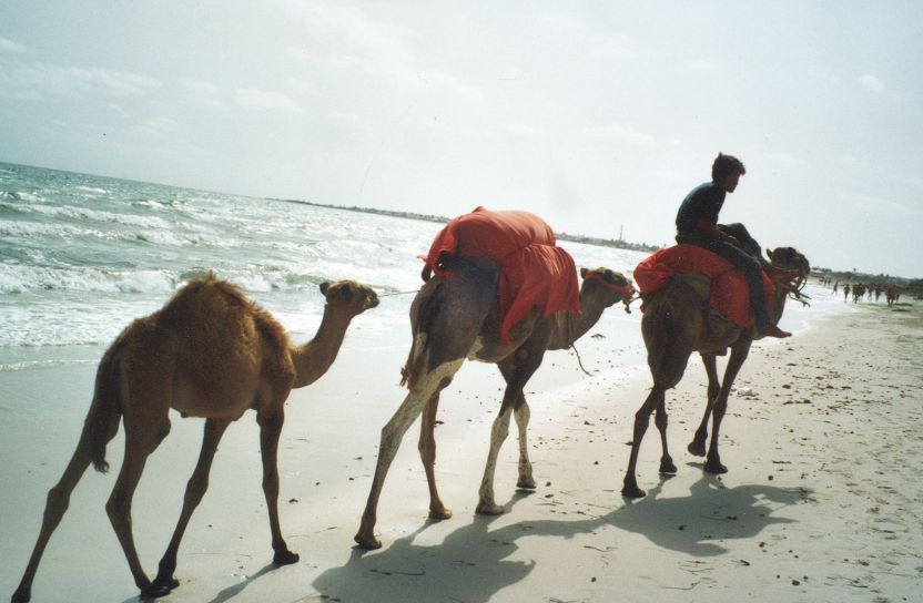 Djerba, Tunisia self-made, September 2000